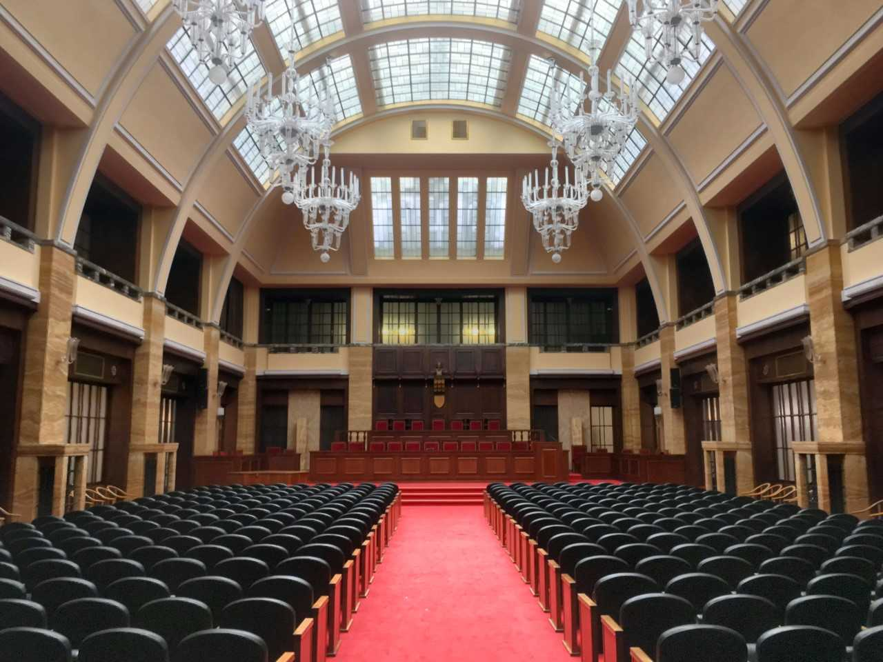 Aula Univerzity Komenského v budove na Šafárikovom námestí.